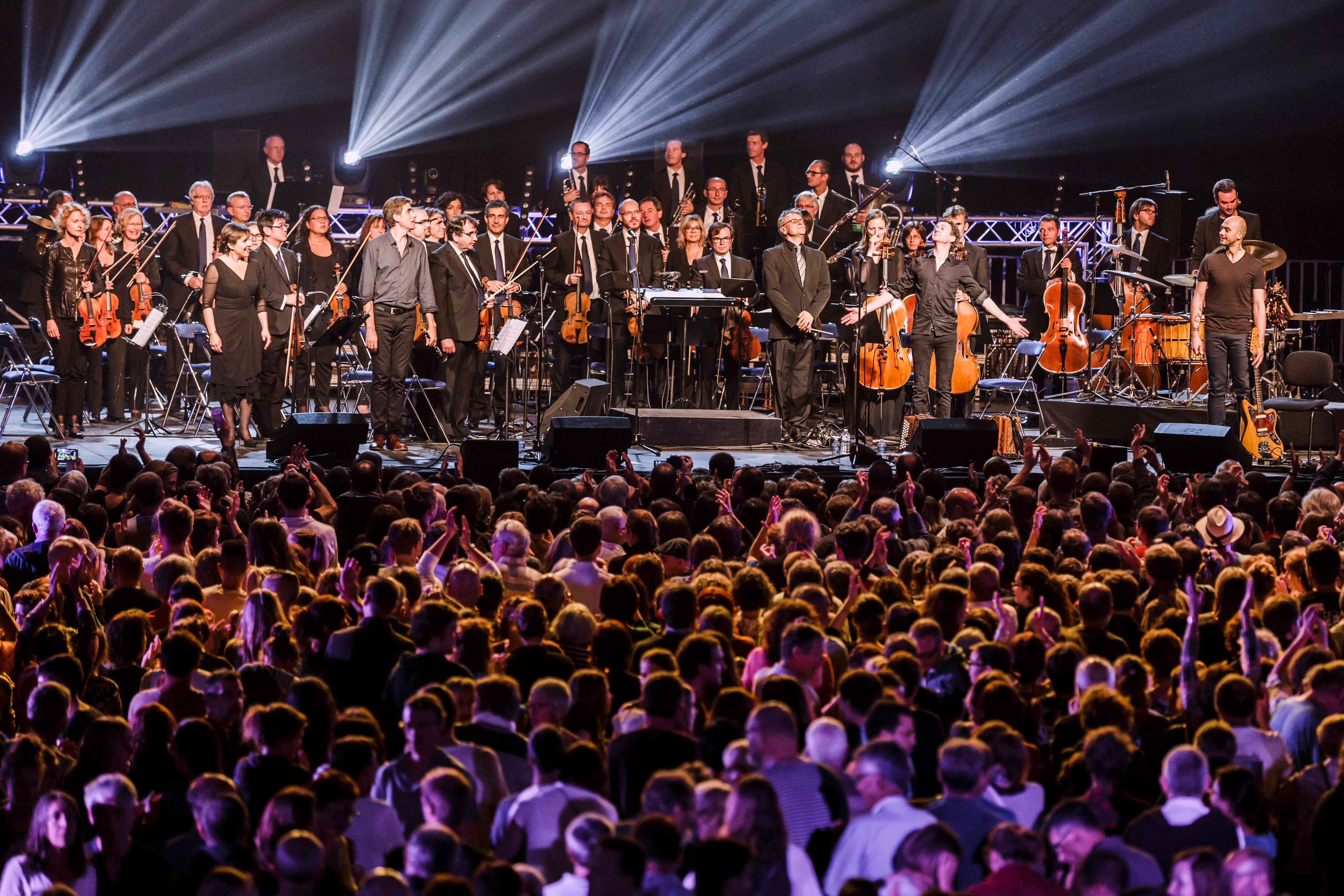 Création du duo Hamon Martin avec l'Orchestre Symphonique de Bretagne à l'occasion du grand fest-noz du festival Yaouank le 19 novembre 2016 au MusikHall du Parc Expo de Rennes.